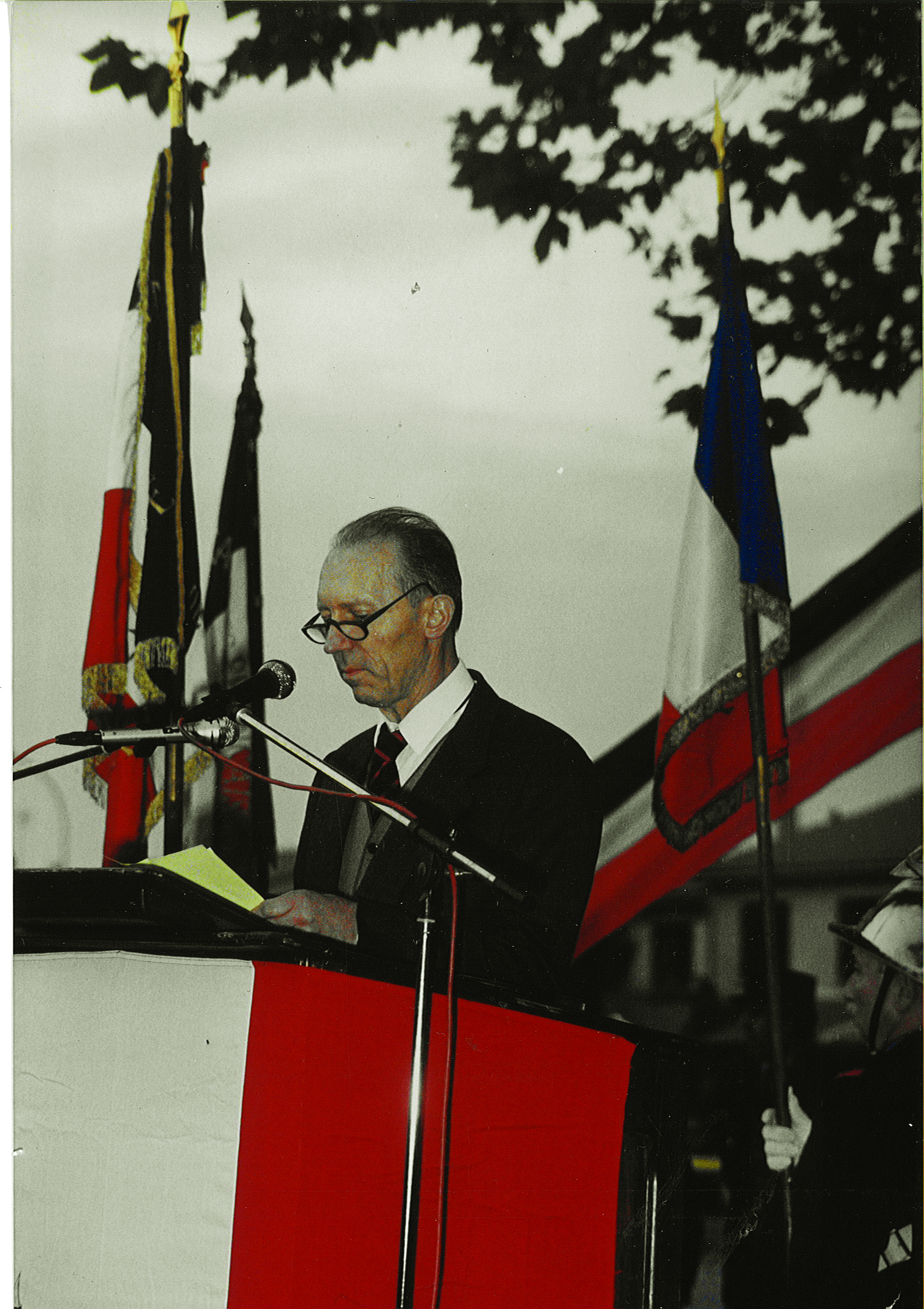 Discours face à des résistants